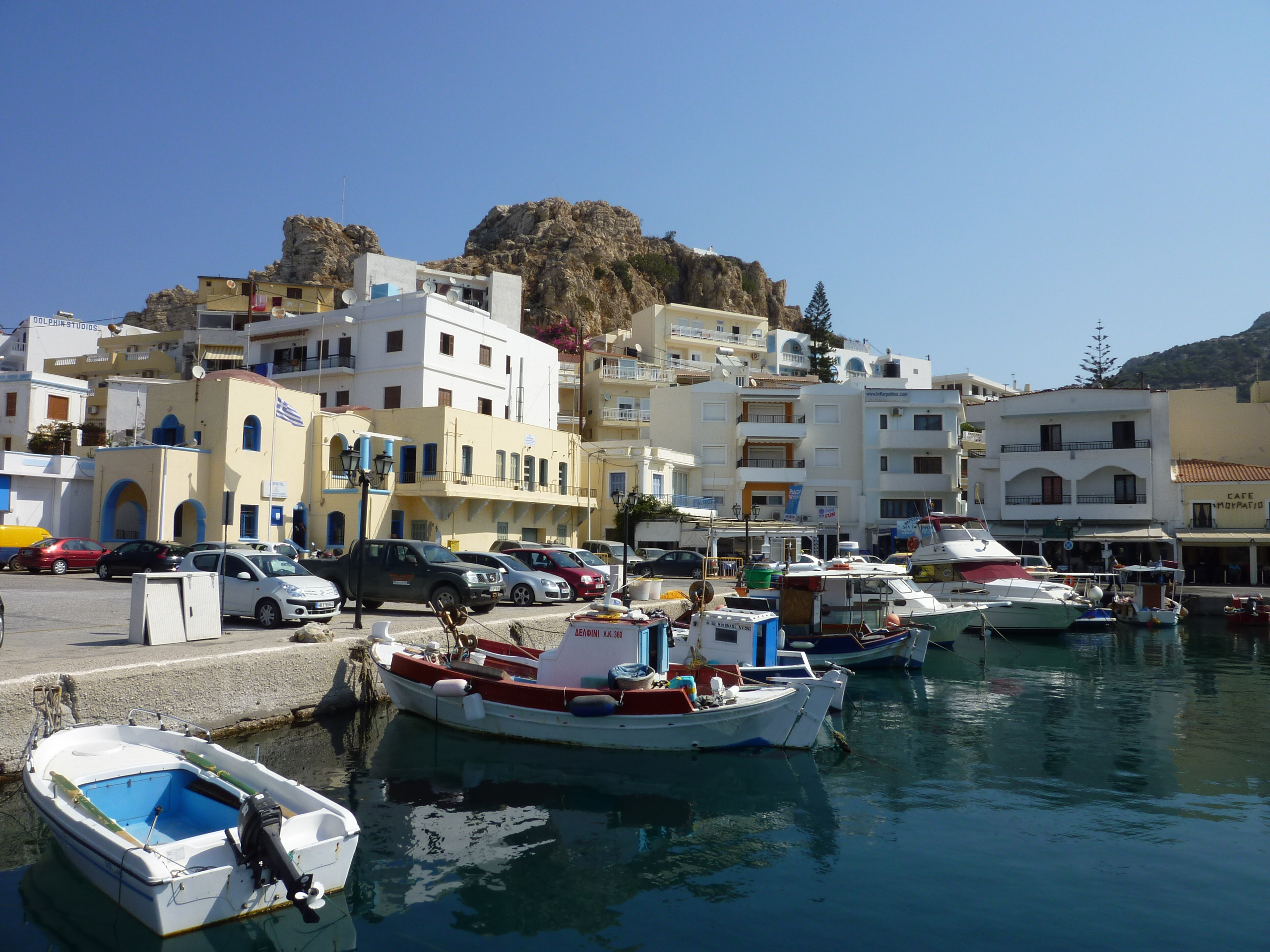 Fischerboote im Hafen von Pigadia